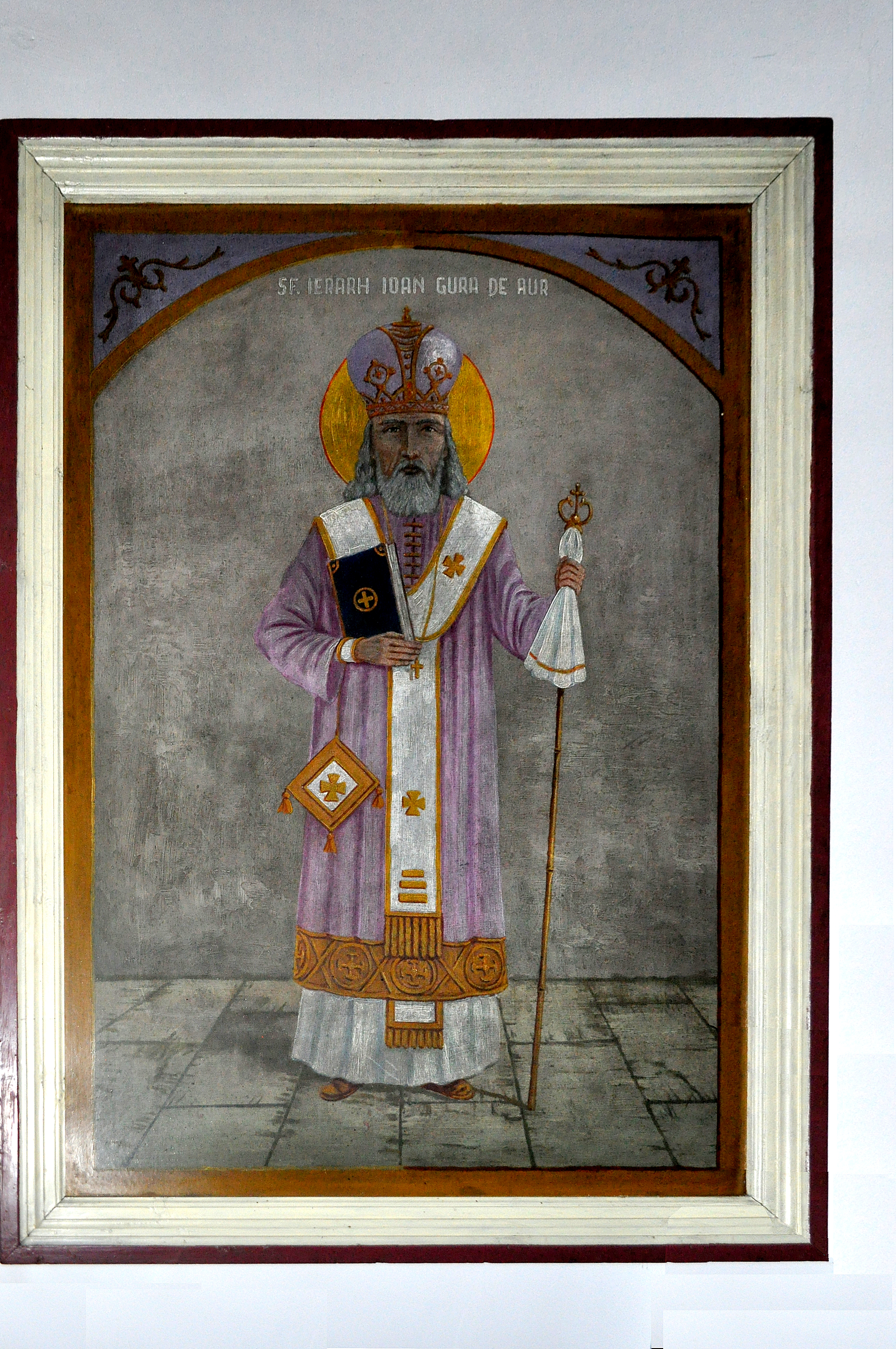 Biserica "Pogorârea Sfântului Duh", sat OSTROV; comuna RÂU DE MORI 01